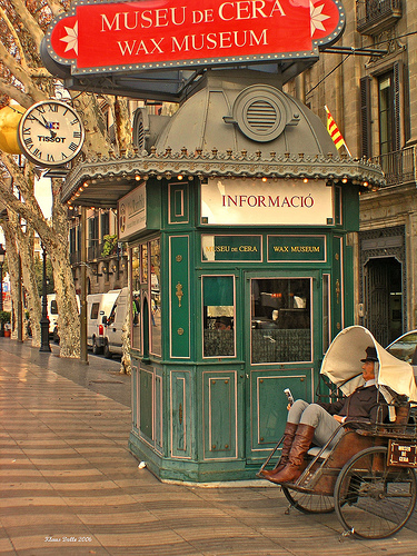 Caseta on es venen les entrades